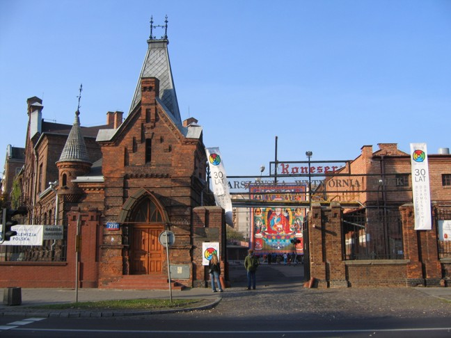 Warszawska Wytwórnia Wódek "Koneser". Kręcony był tu m.in. serial telewizyjny "Doręczyciel".